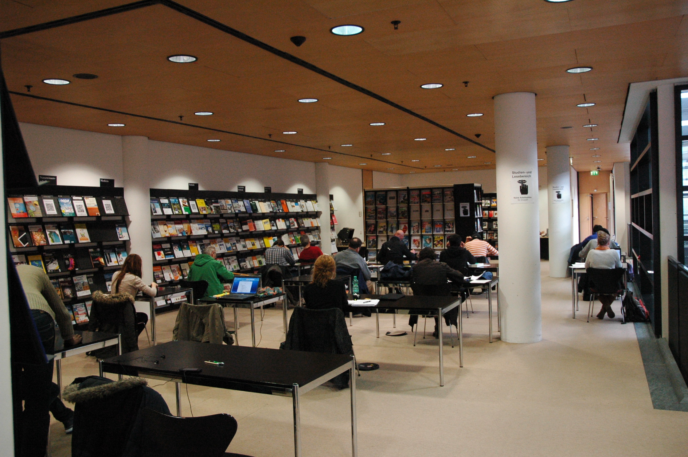 Lernort im 2. Obergeschoss